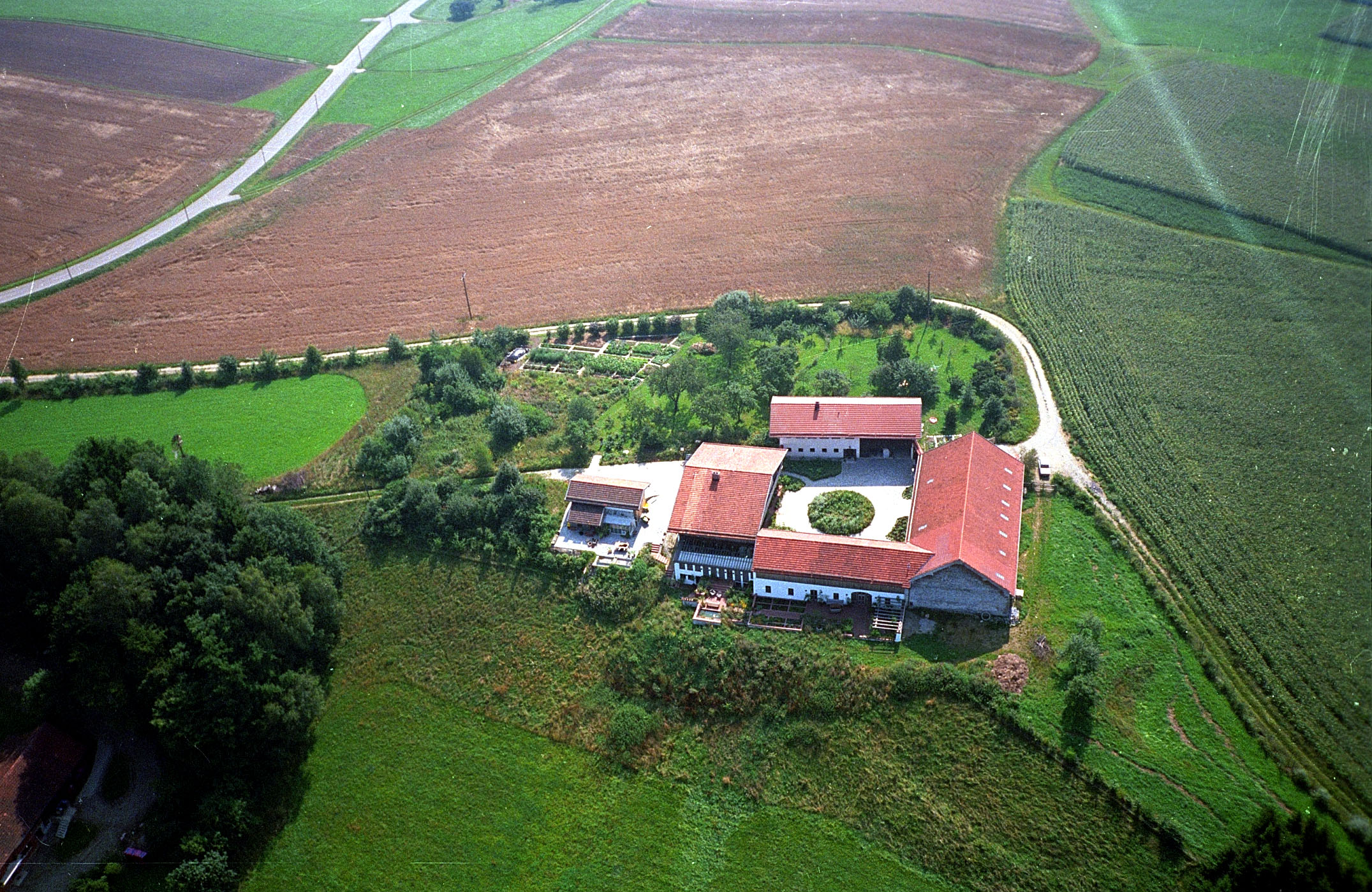 Agrarlandschaft, Garten, Brachwiese und denkmalgeschützter Vierseithof aus dem 18. Jahrhundert im Landkreis Rottal-Inn, analoges Foto; Renovierung und Umbau der Hofgebäude von 1976 - 1983; Anlage der Querbeetgärten im Innenhof und um die Gebäude herum von 1985 - 1993, Produktion der Querbeetsendungen in den Studioräumen des Anwesens und in den Gärten von 1993 - 2010